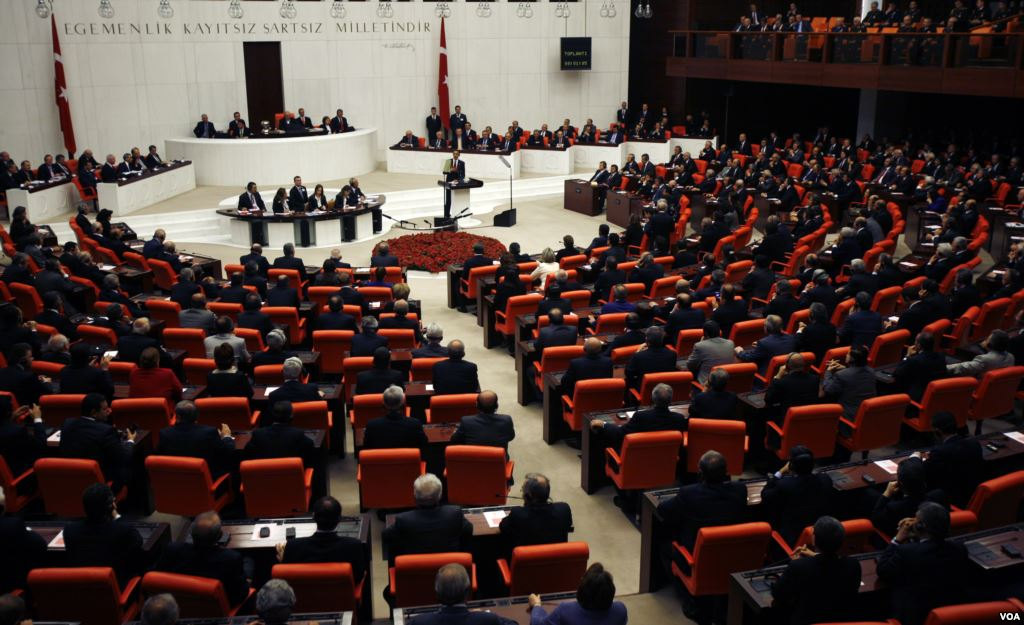 Grand National Assembly of Turkey 23 June 2015